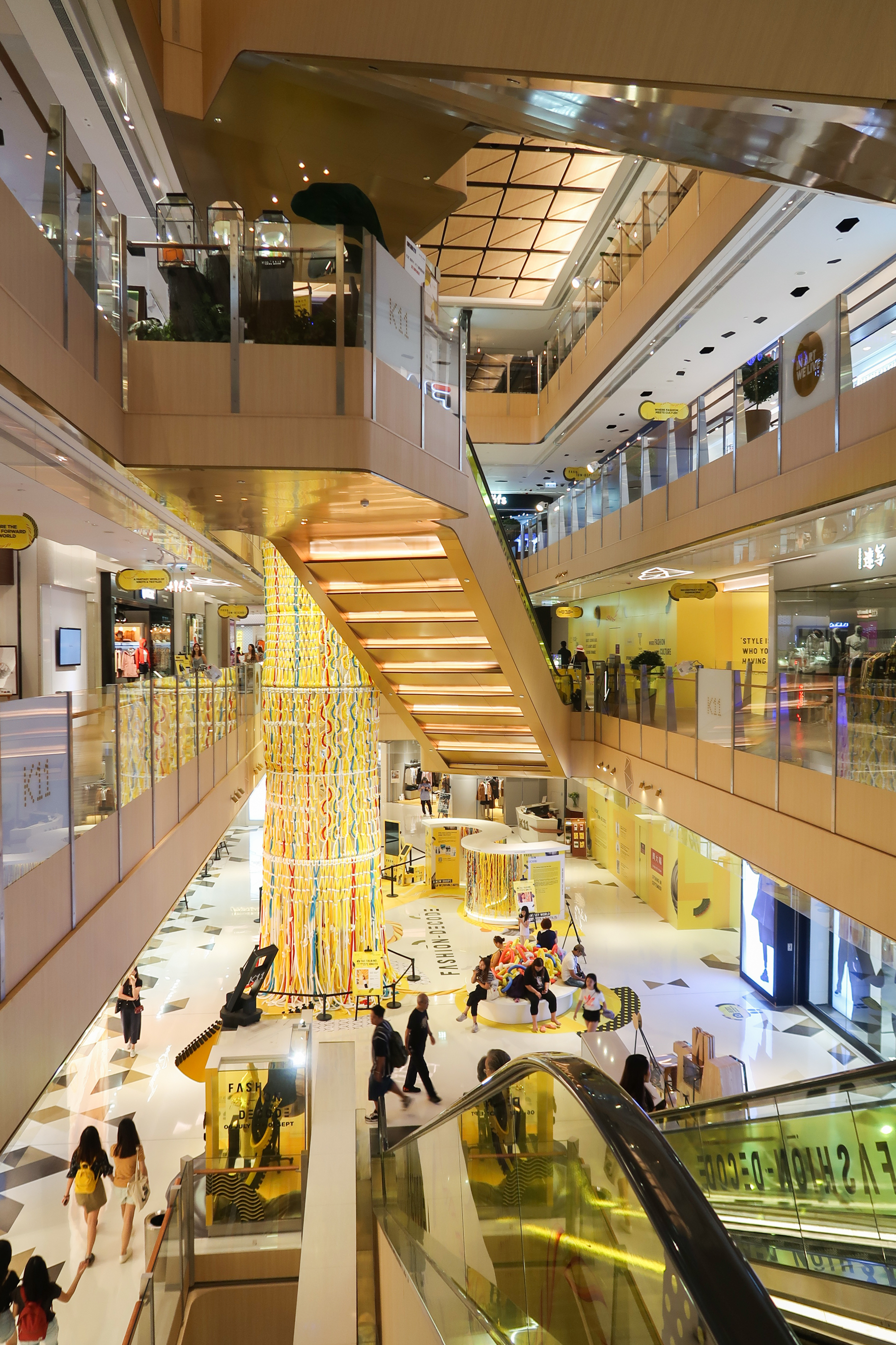 K11 Atrium after renovation